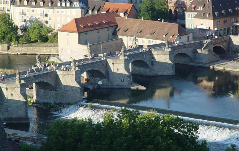 Foto:José Gonçalves